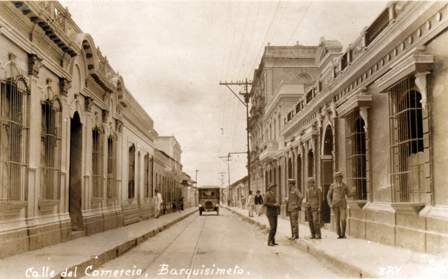 Calle Comercio de Barquisimeto (Hoy Avenida 20) en 1930